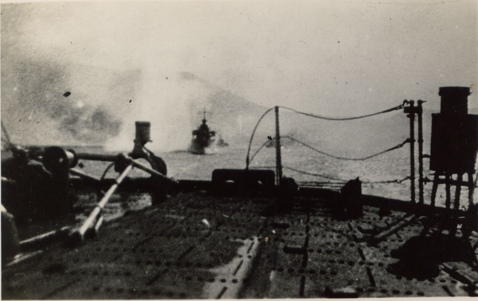 Sortie sous le feu de l'escadre à Mers-el-Kébir le 3 juillet 1940